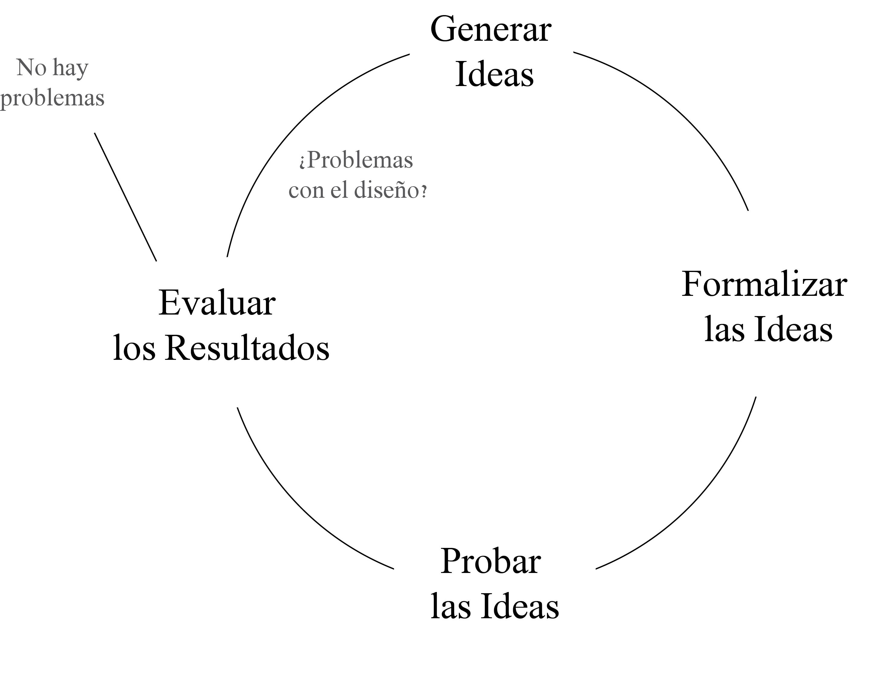 Diagrama que actualmente se utiliza a la hora de desarrollar y diseñar un videojuego.